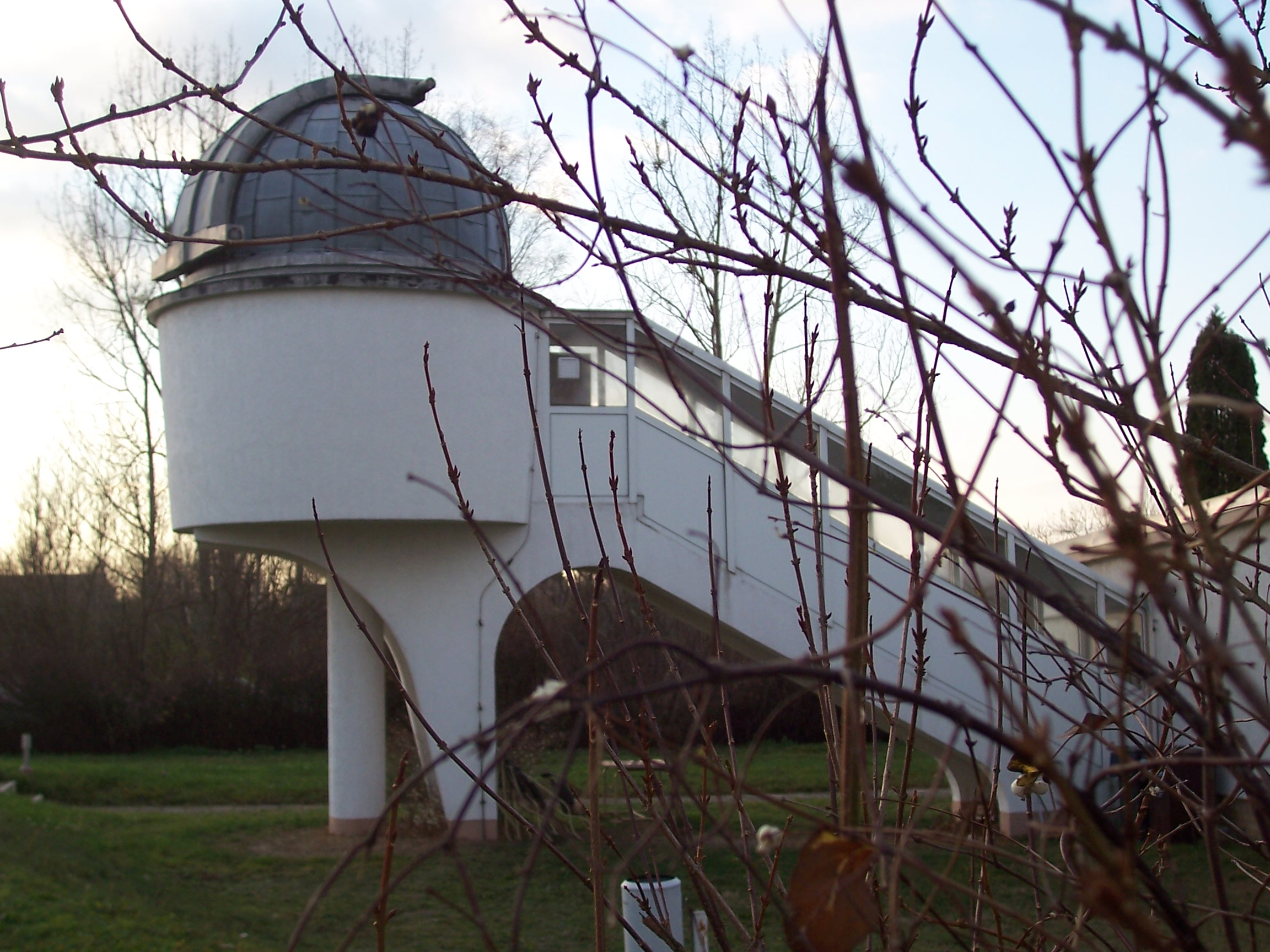 Sternwarte auf dem Mansberg in Eilenburg